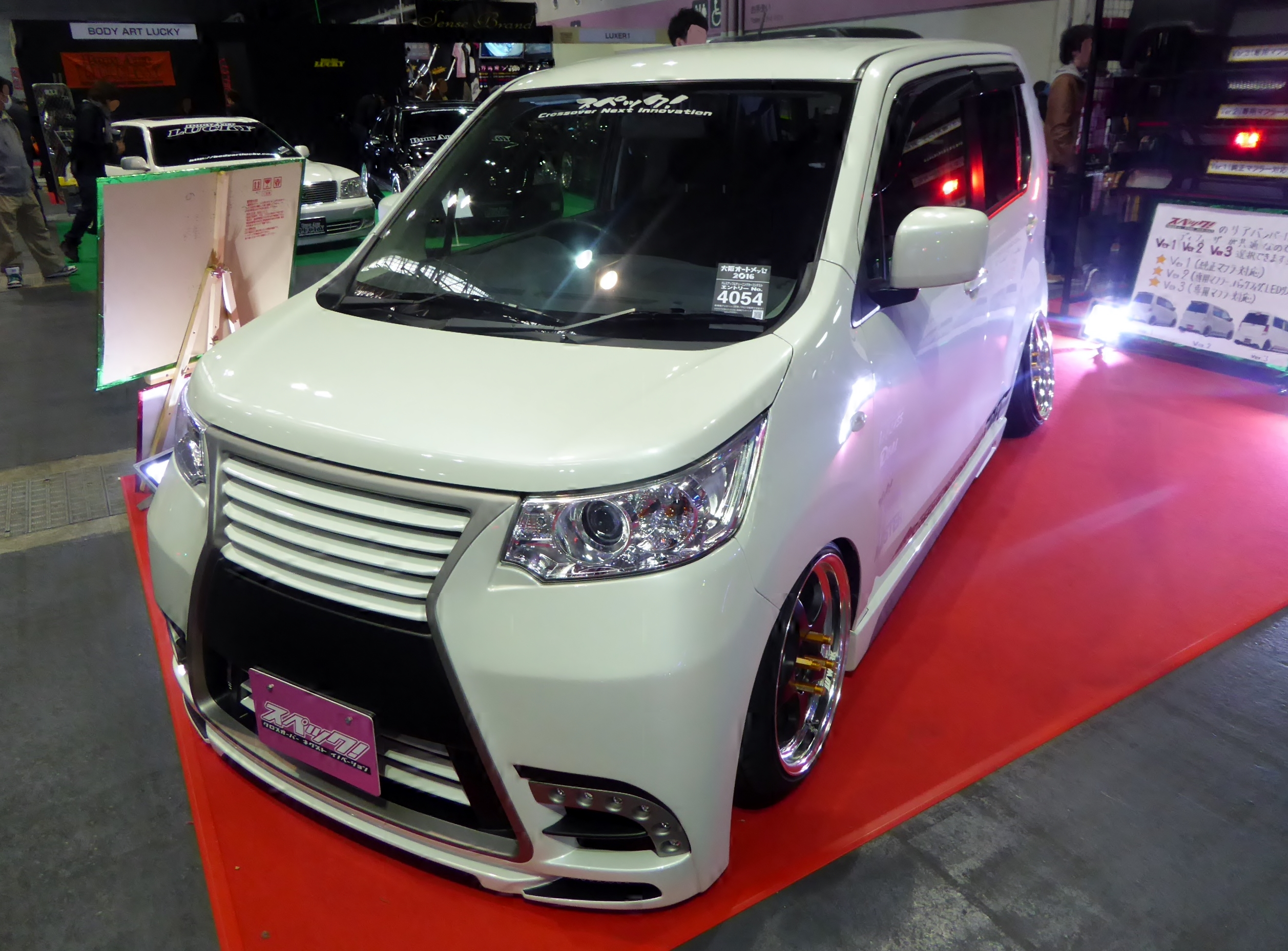 大阪オートメッセ2016においてスペック! S-STYLEパーツ装着のMH34S型スズキ・ワゴンRスティングレーを撮影。